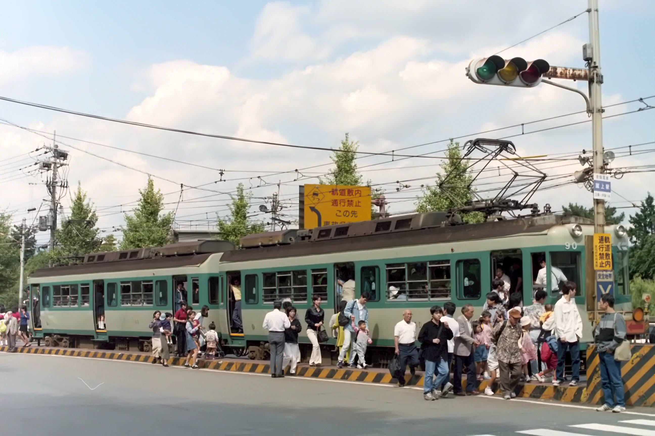 京阪蹴上駅 1997年